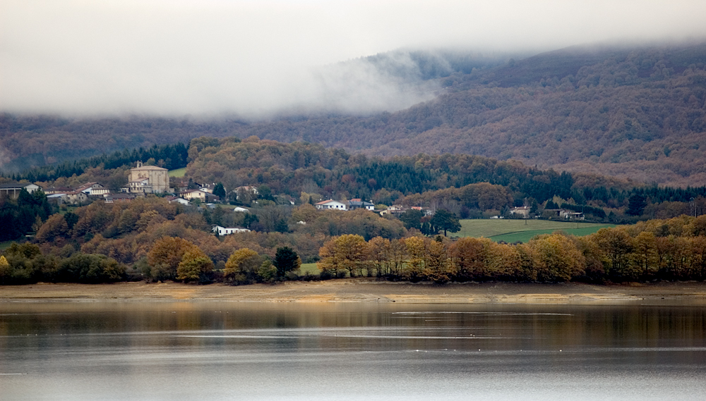 Legutioko udalerriko Elosua-Ollerieta herriko ikuspegia.